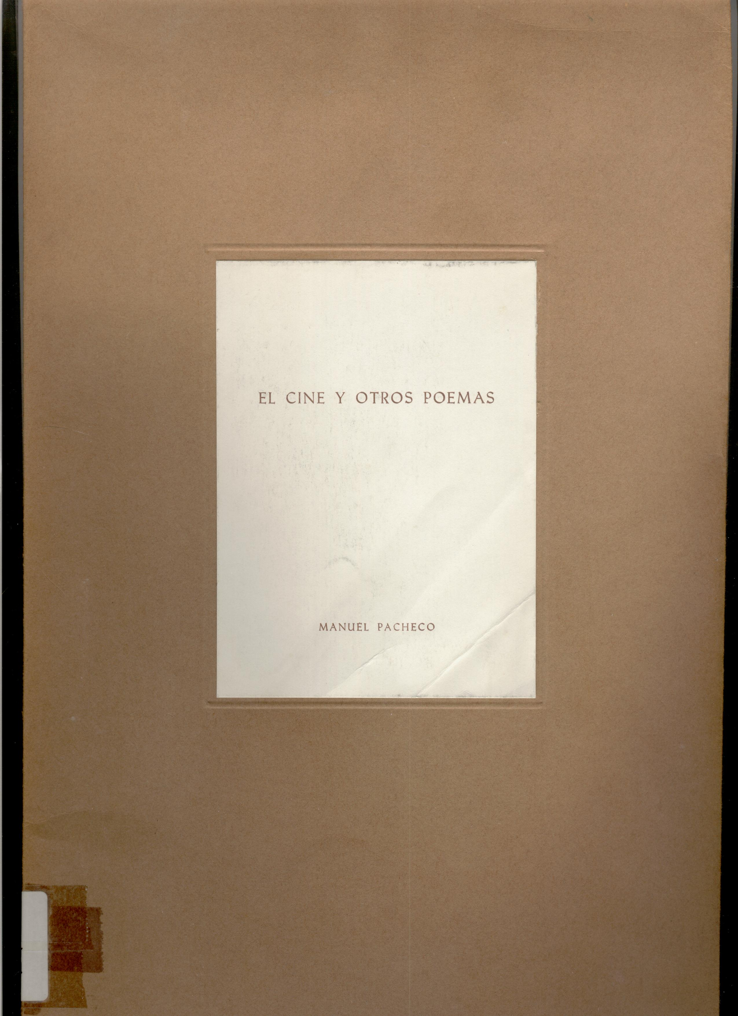 El cine y otros poemas. Diputación Provincial de Badajoz: Institución Cultural "Pedro de Valencia". 1978. Manuel Pacheco (1920–1998) Date of birth/death19 December 192013 March 1998Location of birth/deathOlivenzaBadajozAuthority control : Q54297109